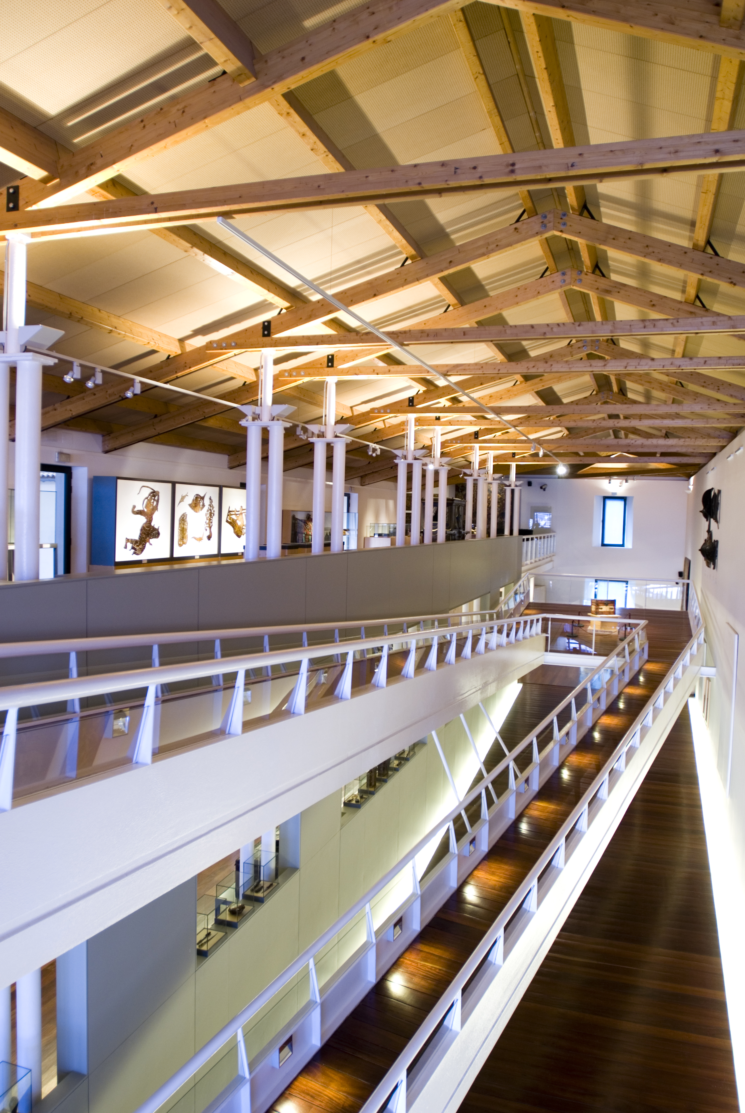 Detall de l'interior del Museu de l'Art de la Pell a Vic. Més informació